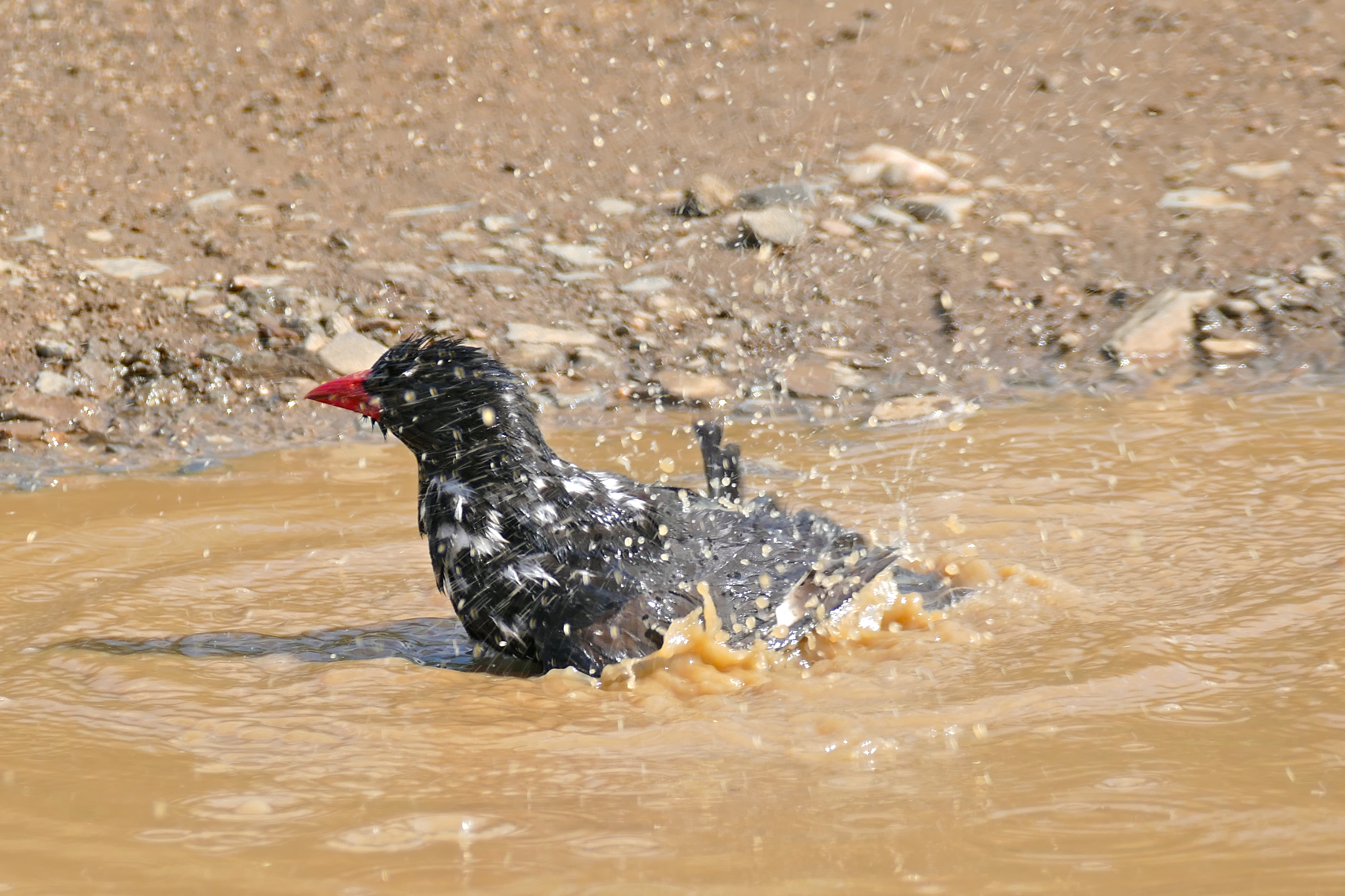 Sunset Dam, Lower Sabie, Kruger NP, SOUTH AFRICA